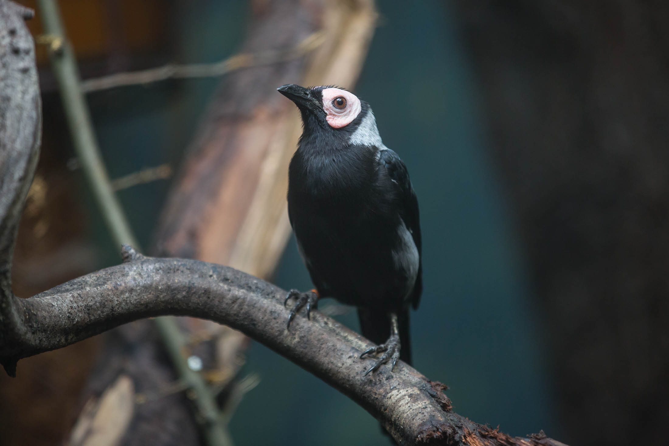 špaček holohlavý v Zoo Praha